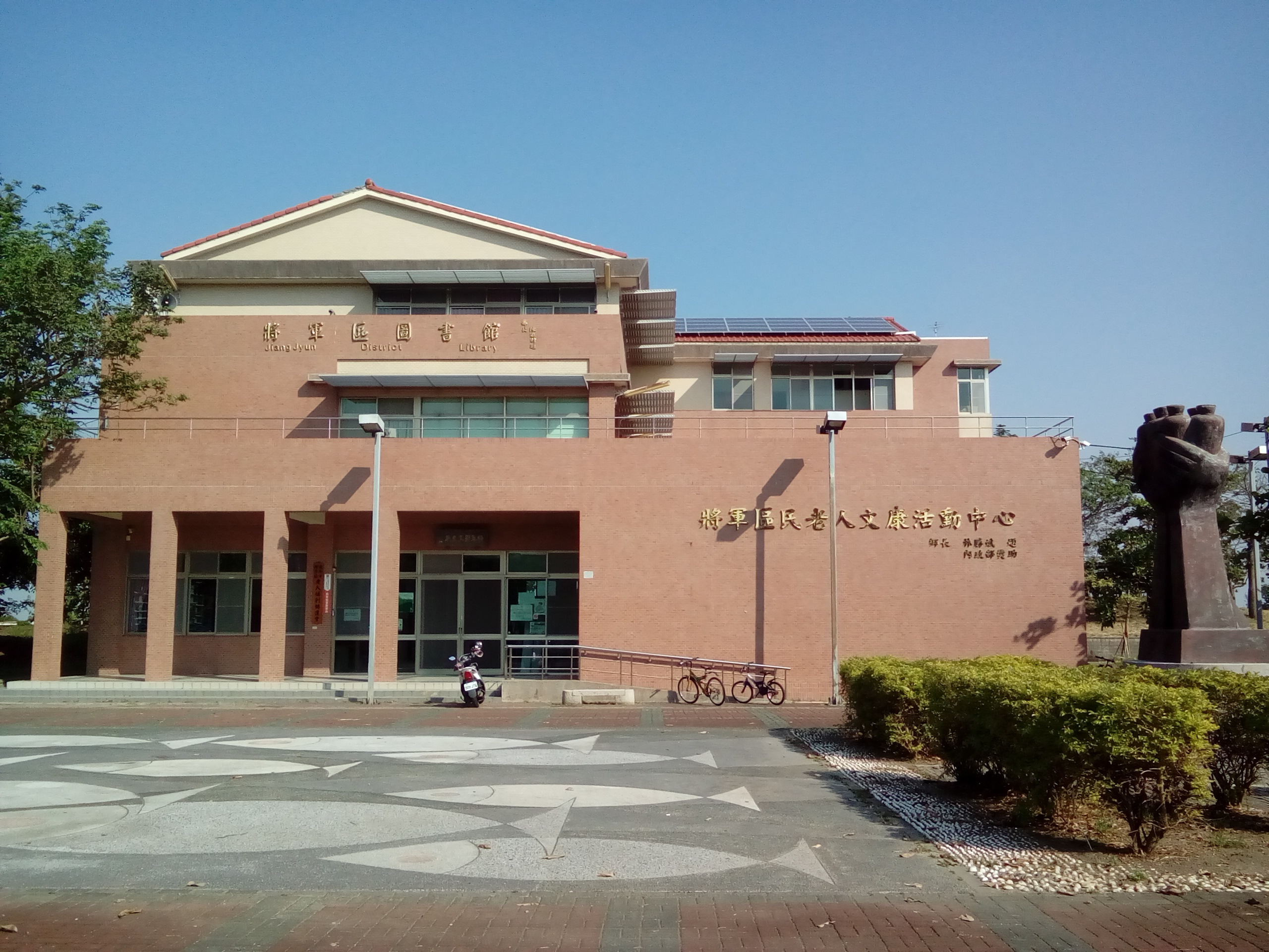 臺南市將軍區圖書館